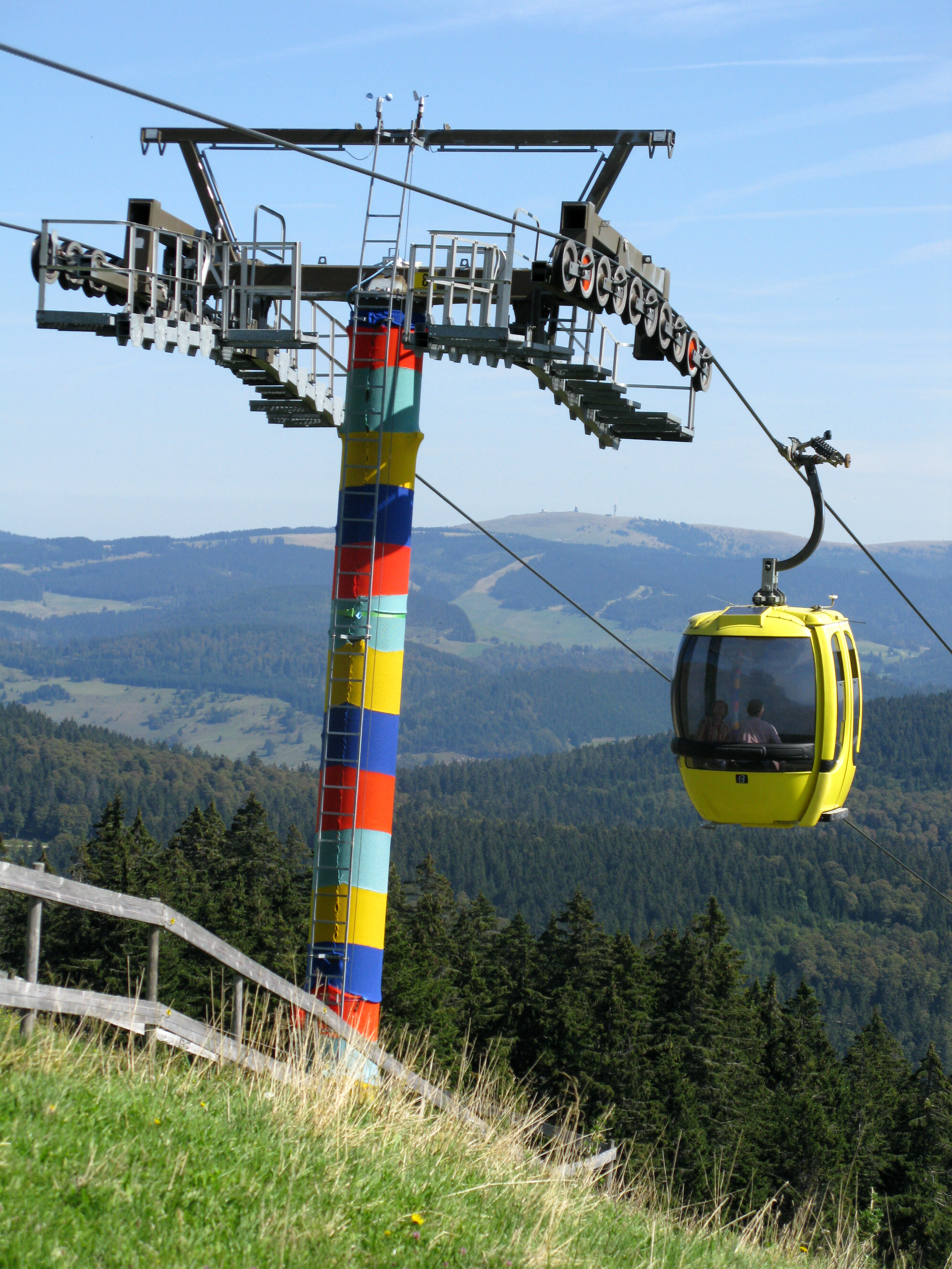 Gondel der Belchenbahn mit umstrickter Stütze, im Hintergrund der Feldberg